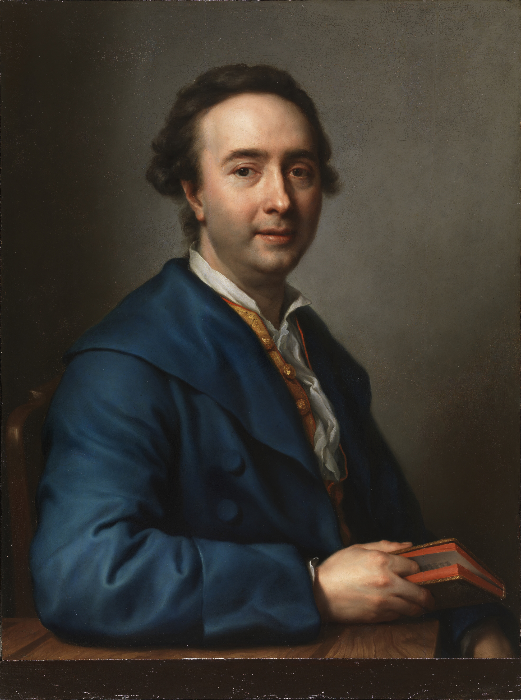 Retrato del político, diplomático y mecenas español José Nicolás de Azara (1730-1804), que fue amigo personal del pintor Anton Raphael Mengs.